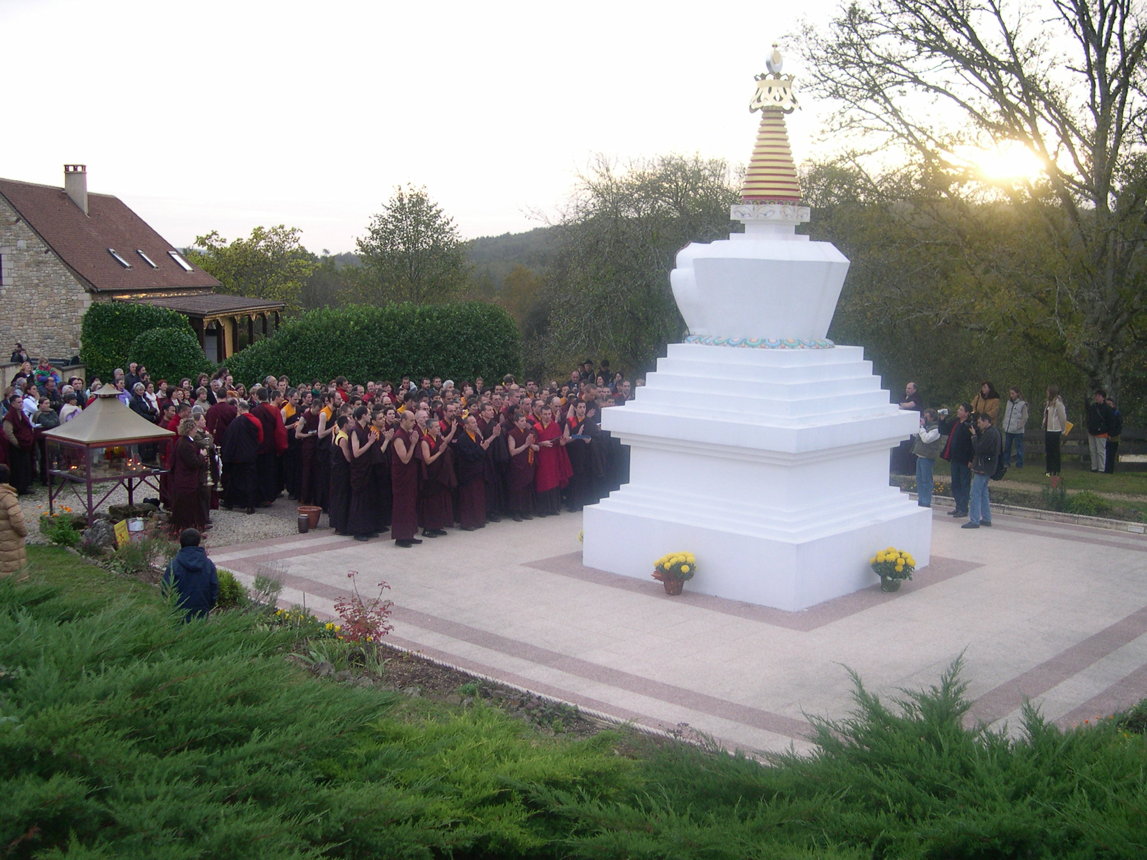 Image de sortie de retraite au centre Dhagpo Kagyu Ling en 2004.